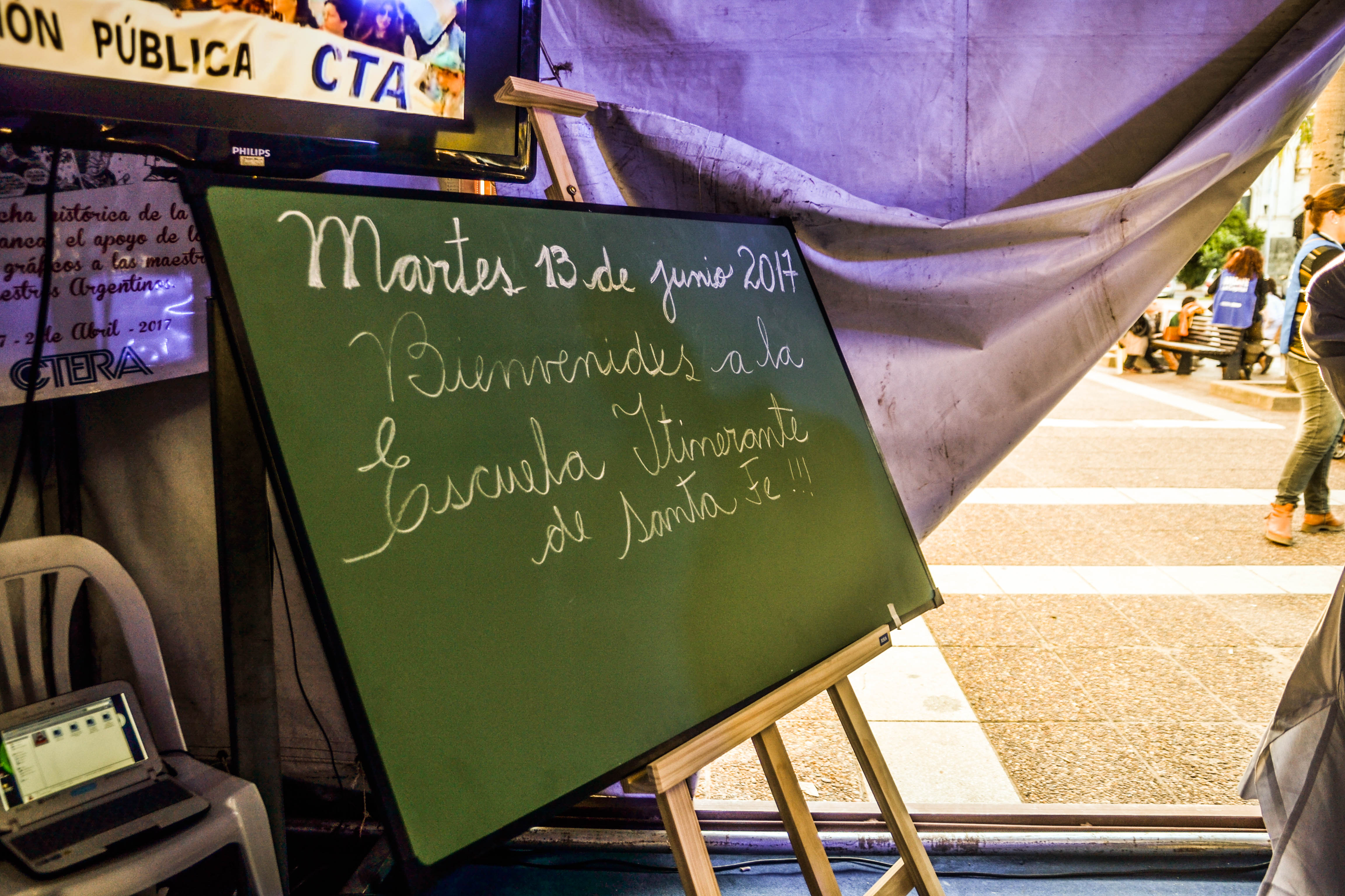 Escuela pública itinerante en la ciudad de Santa Fe